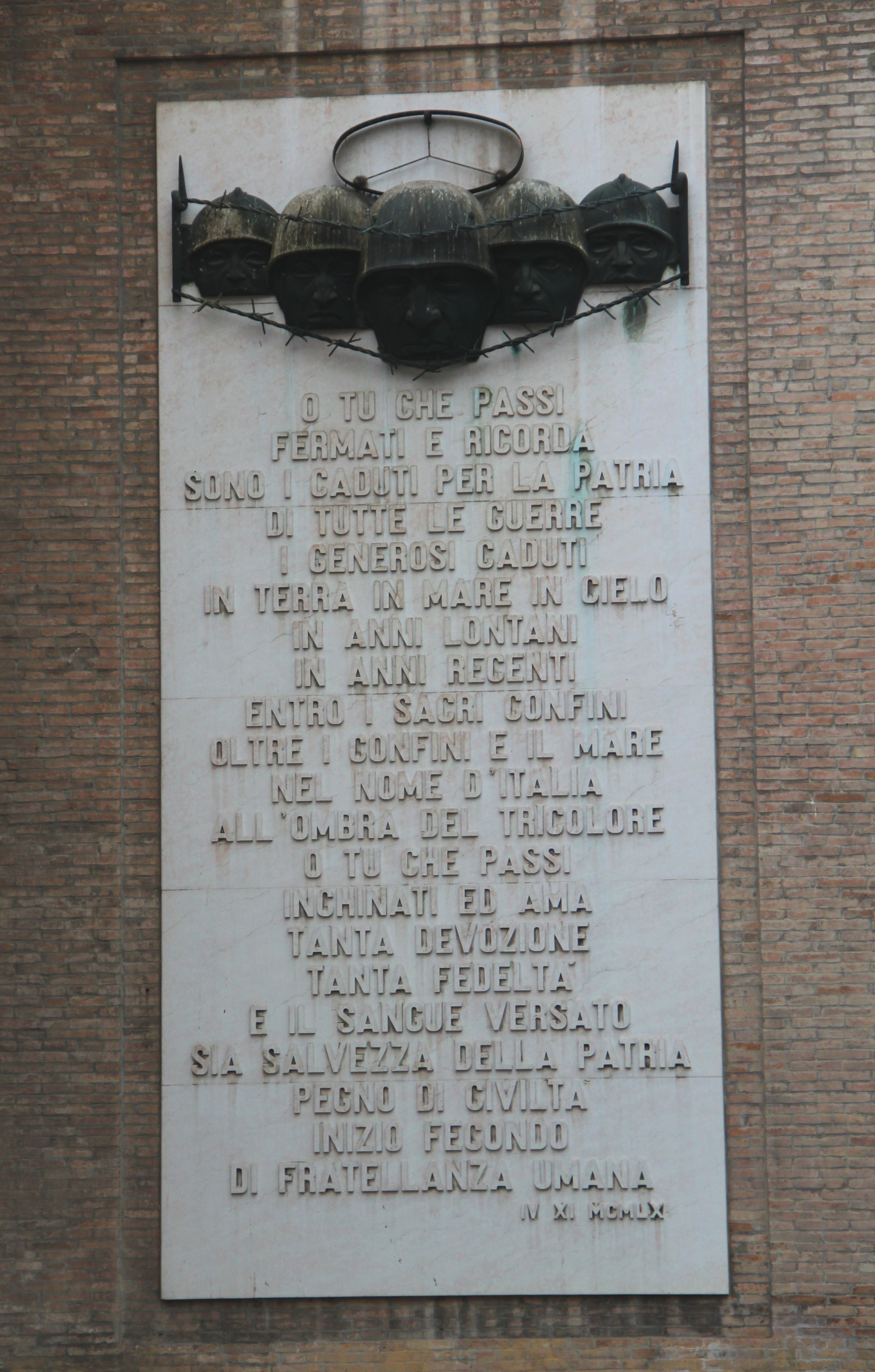 Parma, Kirchturm von San Paolo